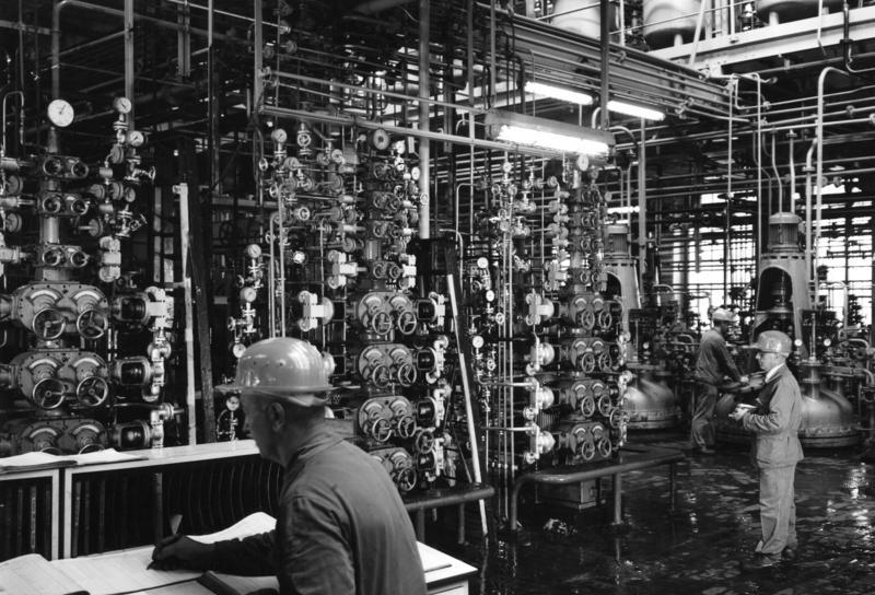 Dosierpumpen einer Anlage zur Herstellung des Synthesekautschuks Perbunan N im Werk Leverkusen der Farbenfabriken Bayer